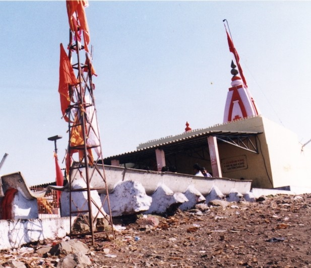 chamunda mata mandir Chotila